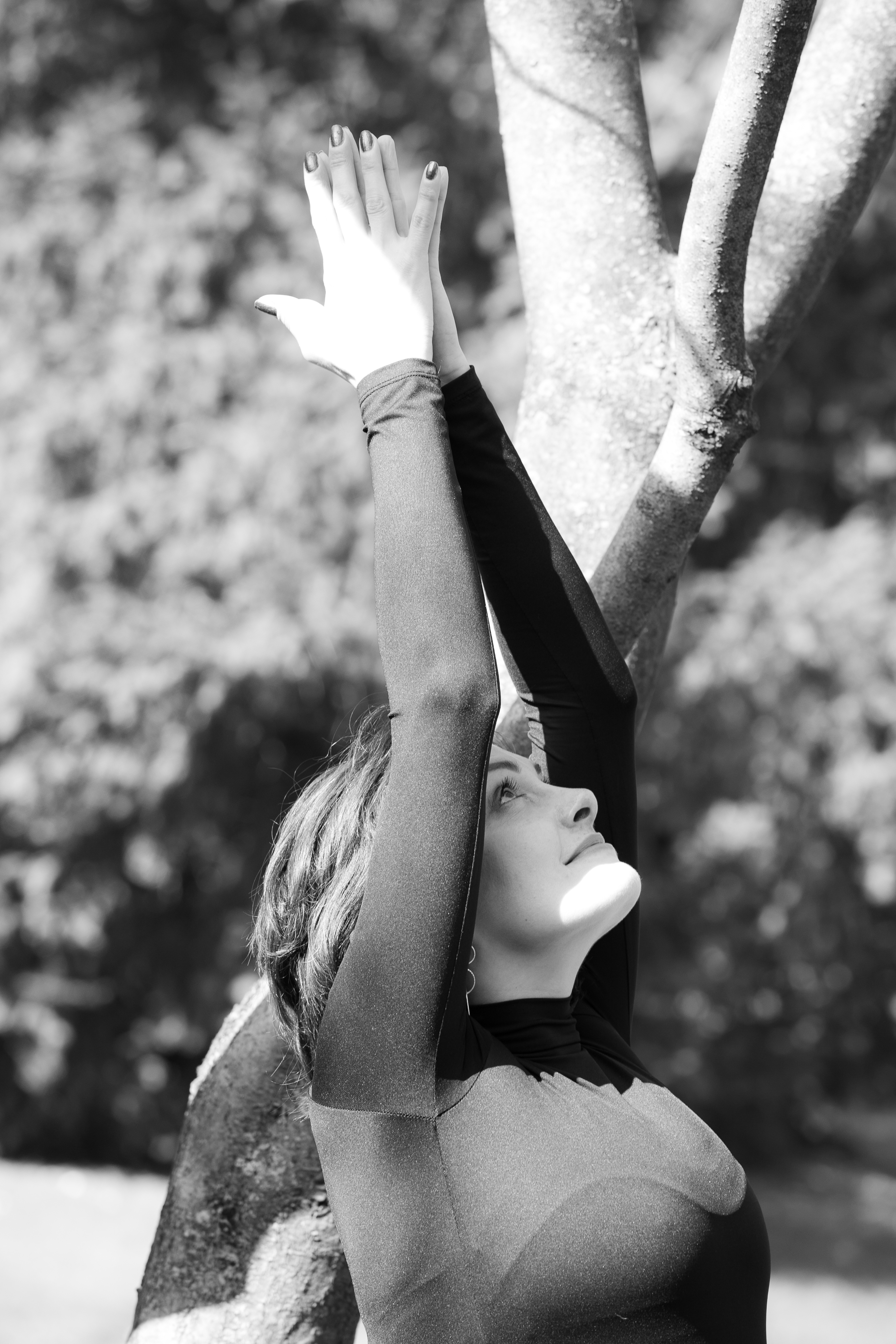 Ferdie Happy Yoga 1 - Happy Yoga